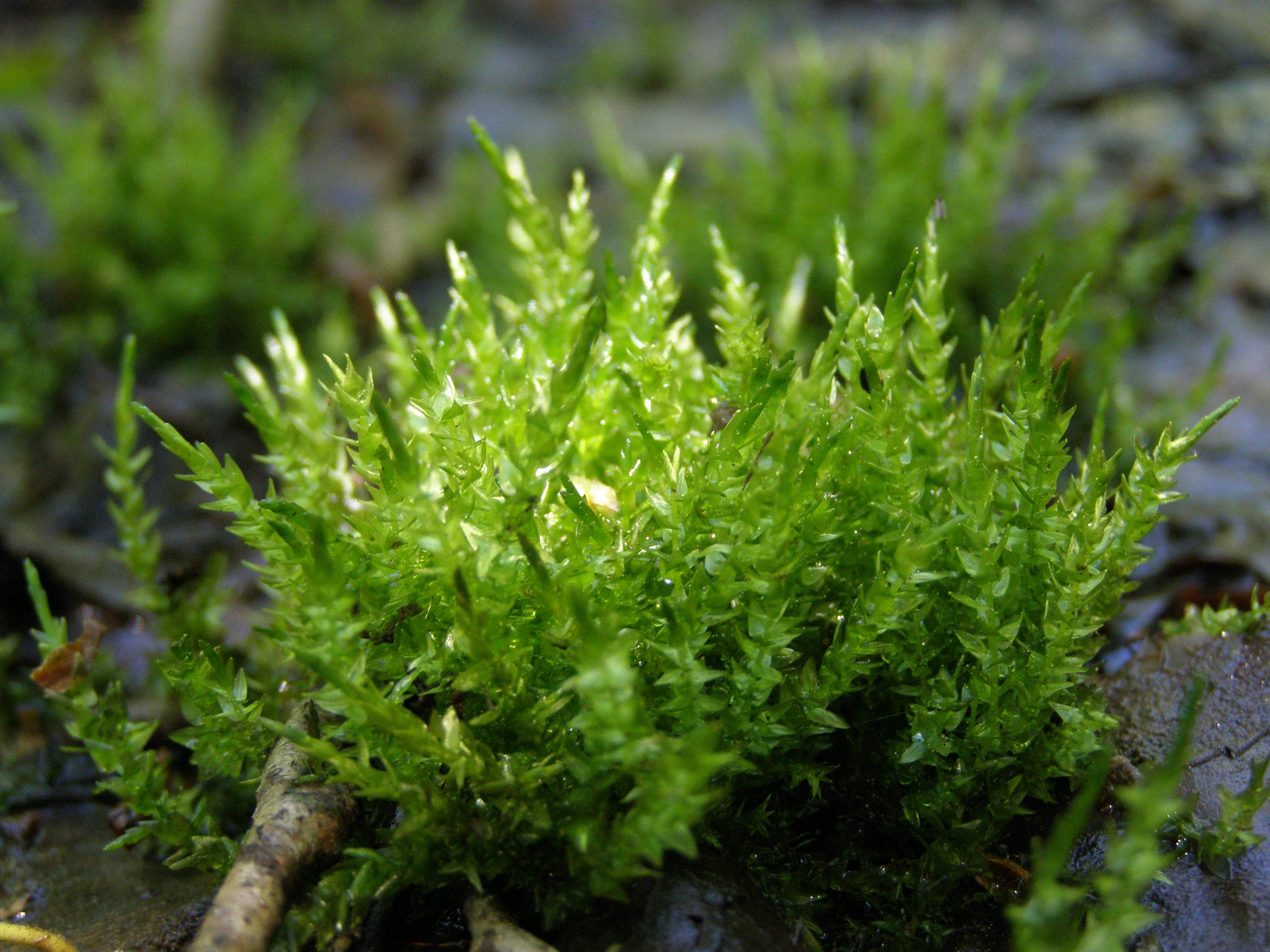 Сукачове, Коростенський р-н, ДП «Коростенське ЛМГ», Ушомирське лісництво, кв. 69, вид. 19, 21, 22